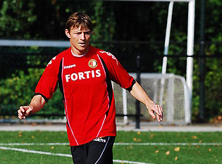 Een foto van Jon Dahl Tomasson, gemaakt op 30 augustus 2008 tijdens een training van Feyenoord.